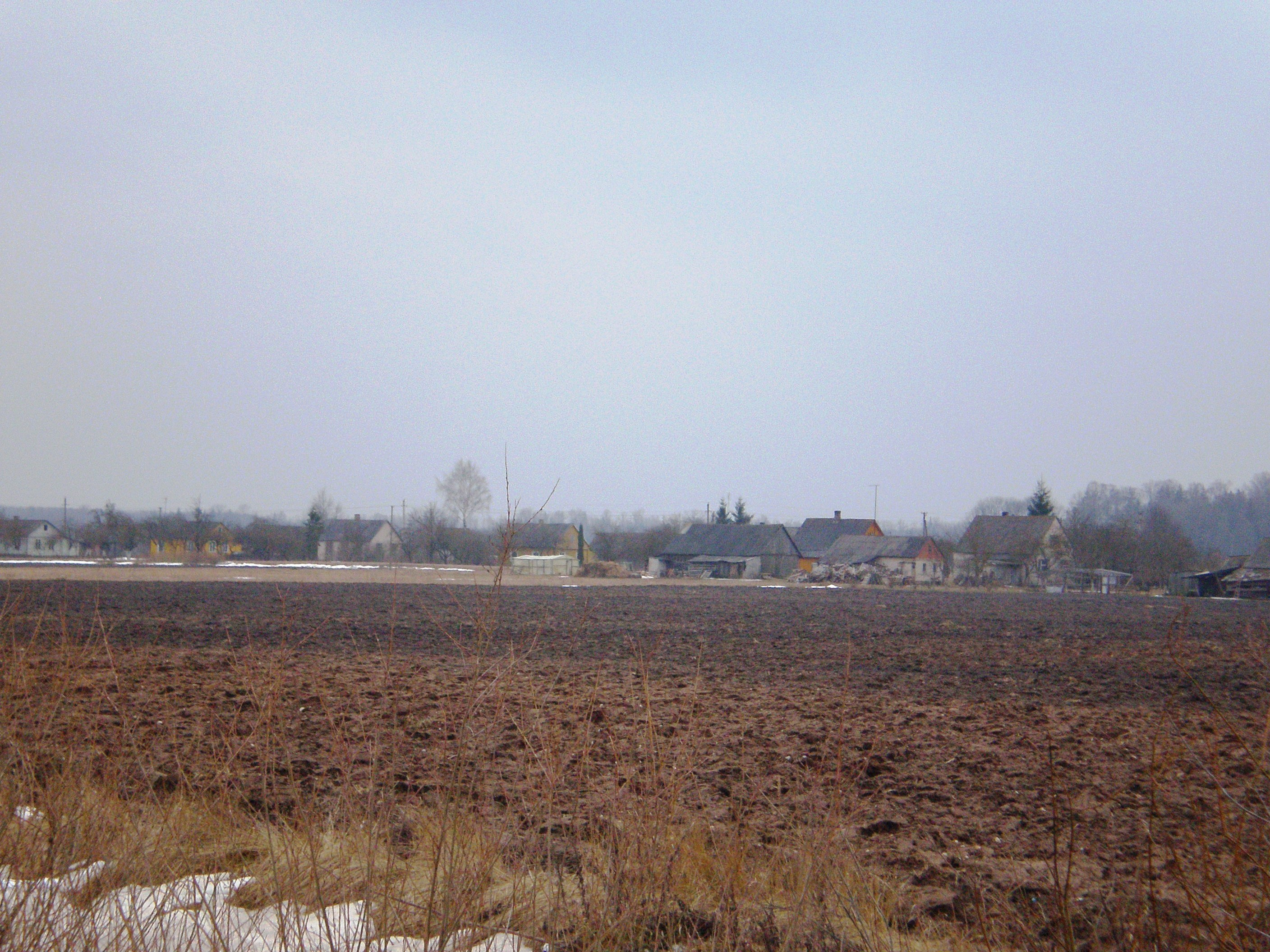 Medininkai, Kėdainių raj.